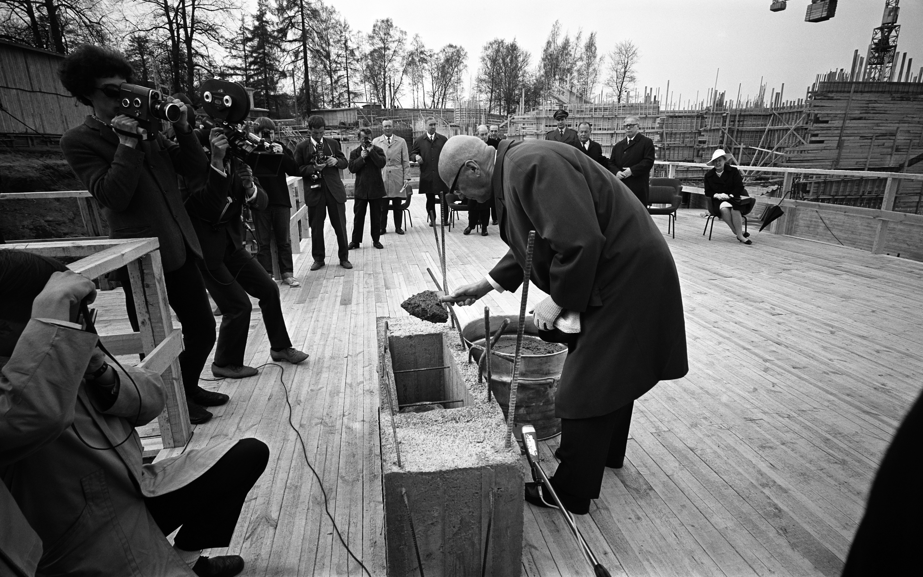 Finlandia-talon kongressi- ja konserttitalon peruskiven muuraus, presidentti Urho Kekkonen muuraamassa.